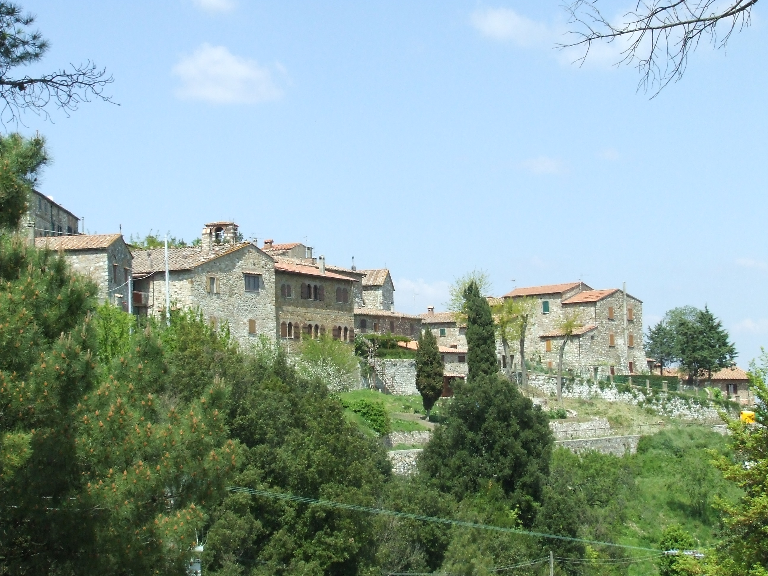 This is a picture of Libbiano, I've maked by myself